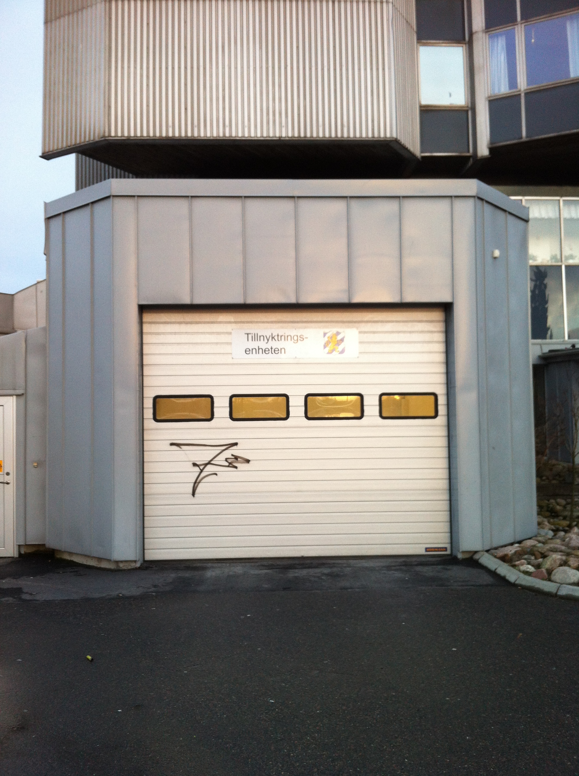 Tillnyktringsenheten i Göteborg, 2012. Westsamhuset, Colin Campbells plats 1, Olskroken, Göteborg.